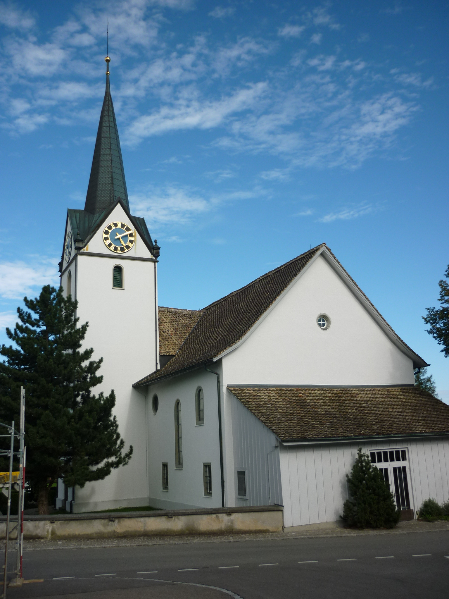 Kirche Hirzel ZH, Schweiz